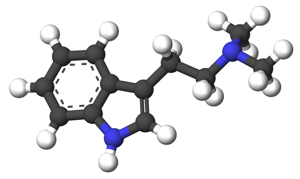 Dimethyltryptamine